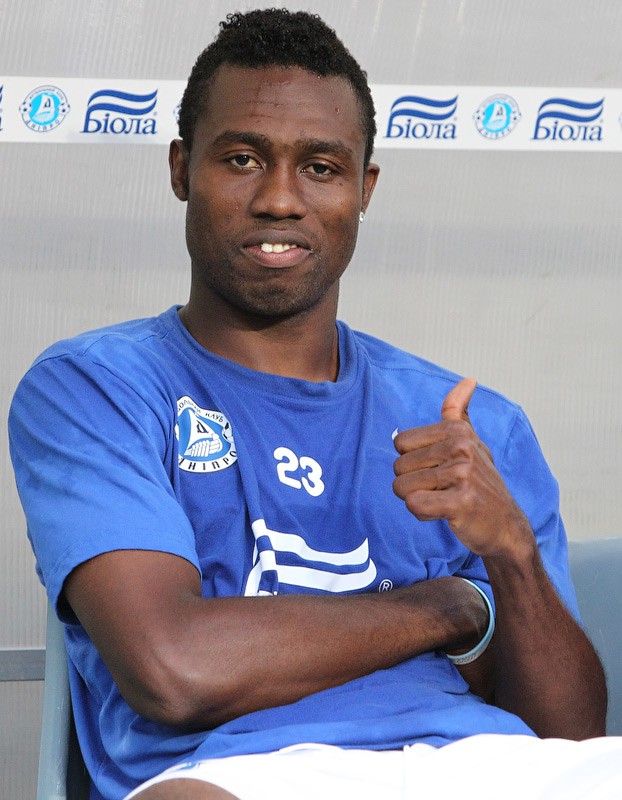 Michael Odibe